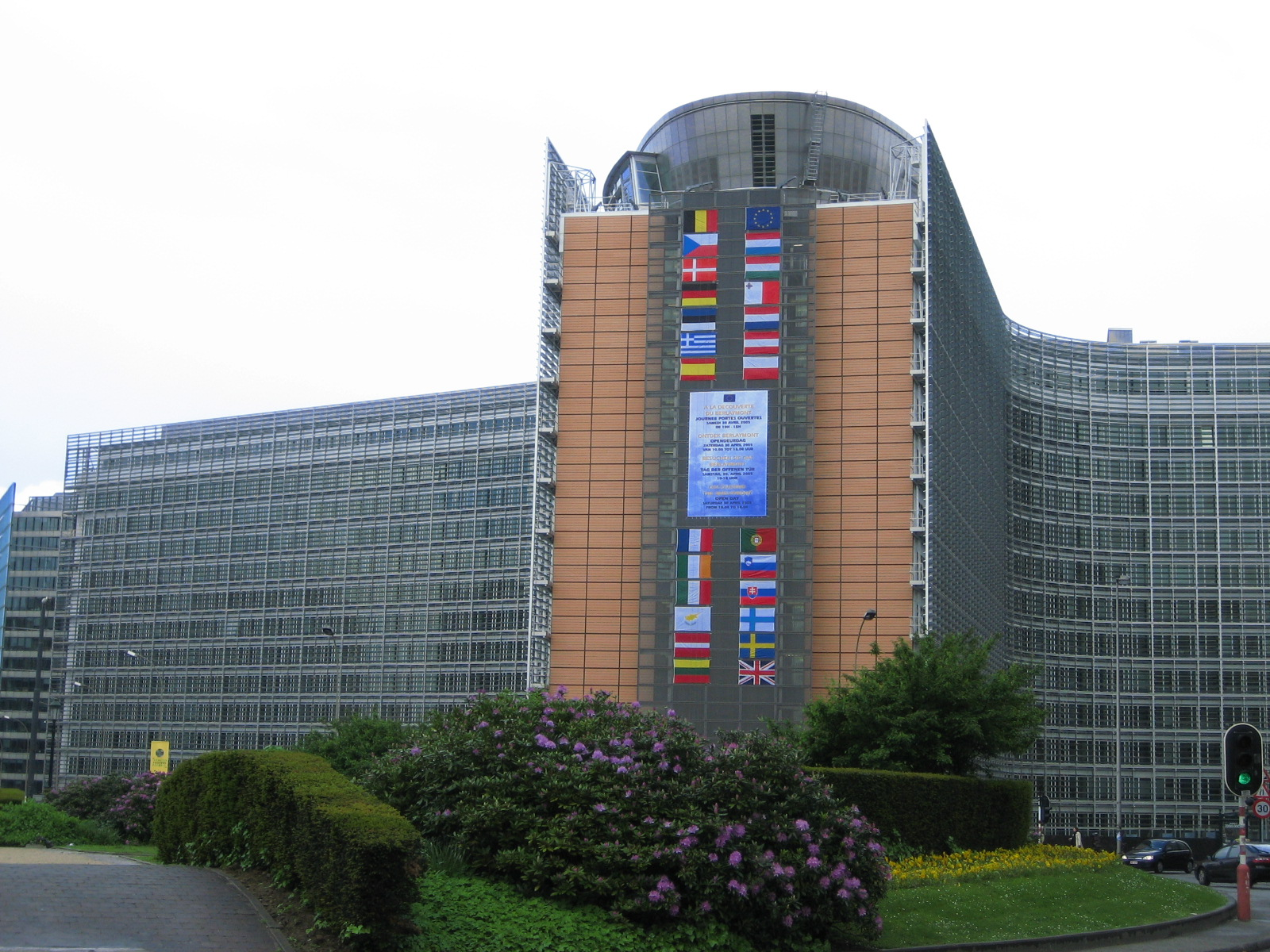 Sujet: D'Berlaymont-Gebai zu Bréissel, Sëtz vun der Europäescher Kommissioun. Datum: 2005-05-08 Auteur: :User:Zinneke Lizenz:CC-BY-SA